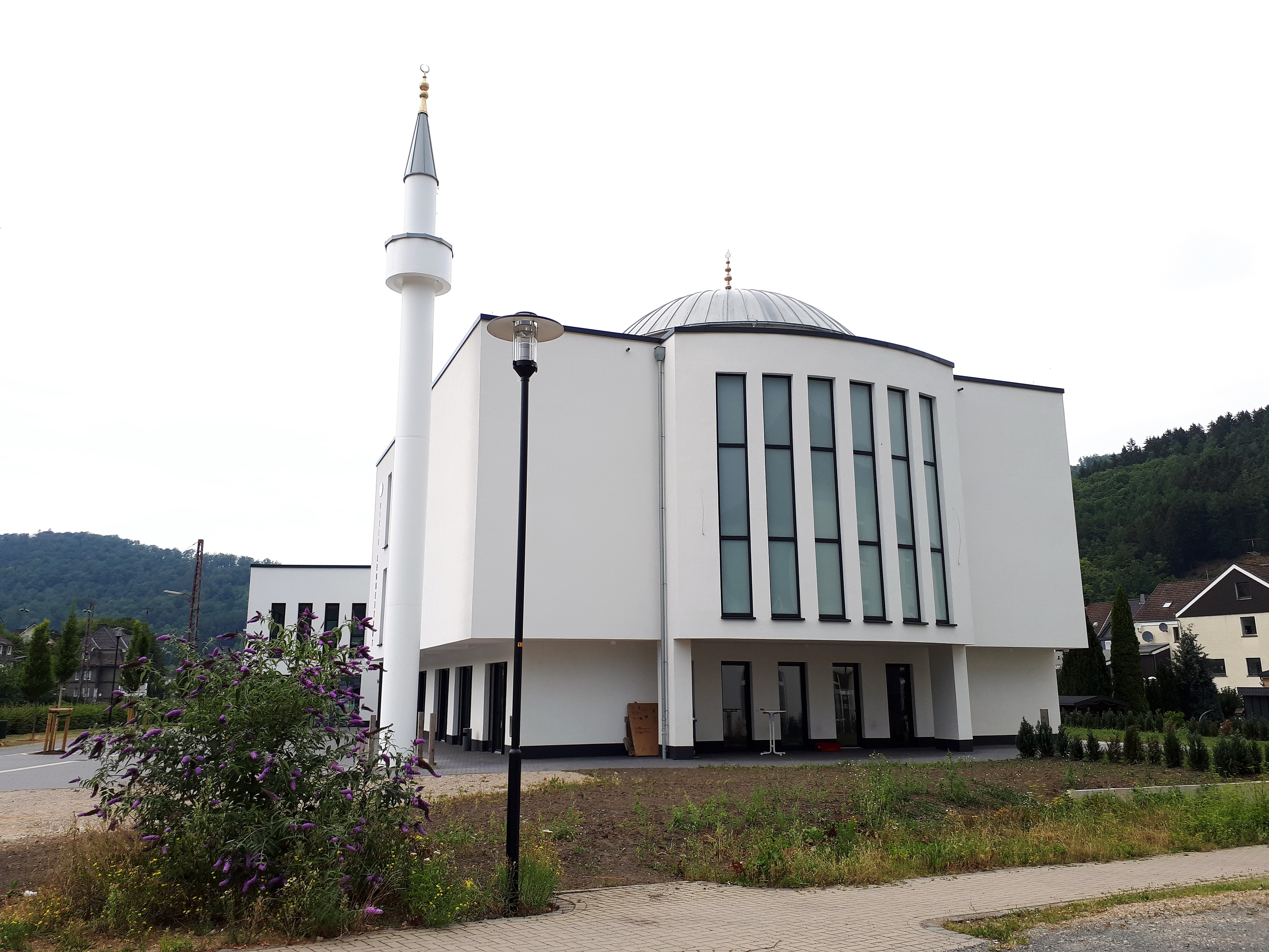 Im Jahr 2017 eröffnetes Moschee-Gebäude in Meggen